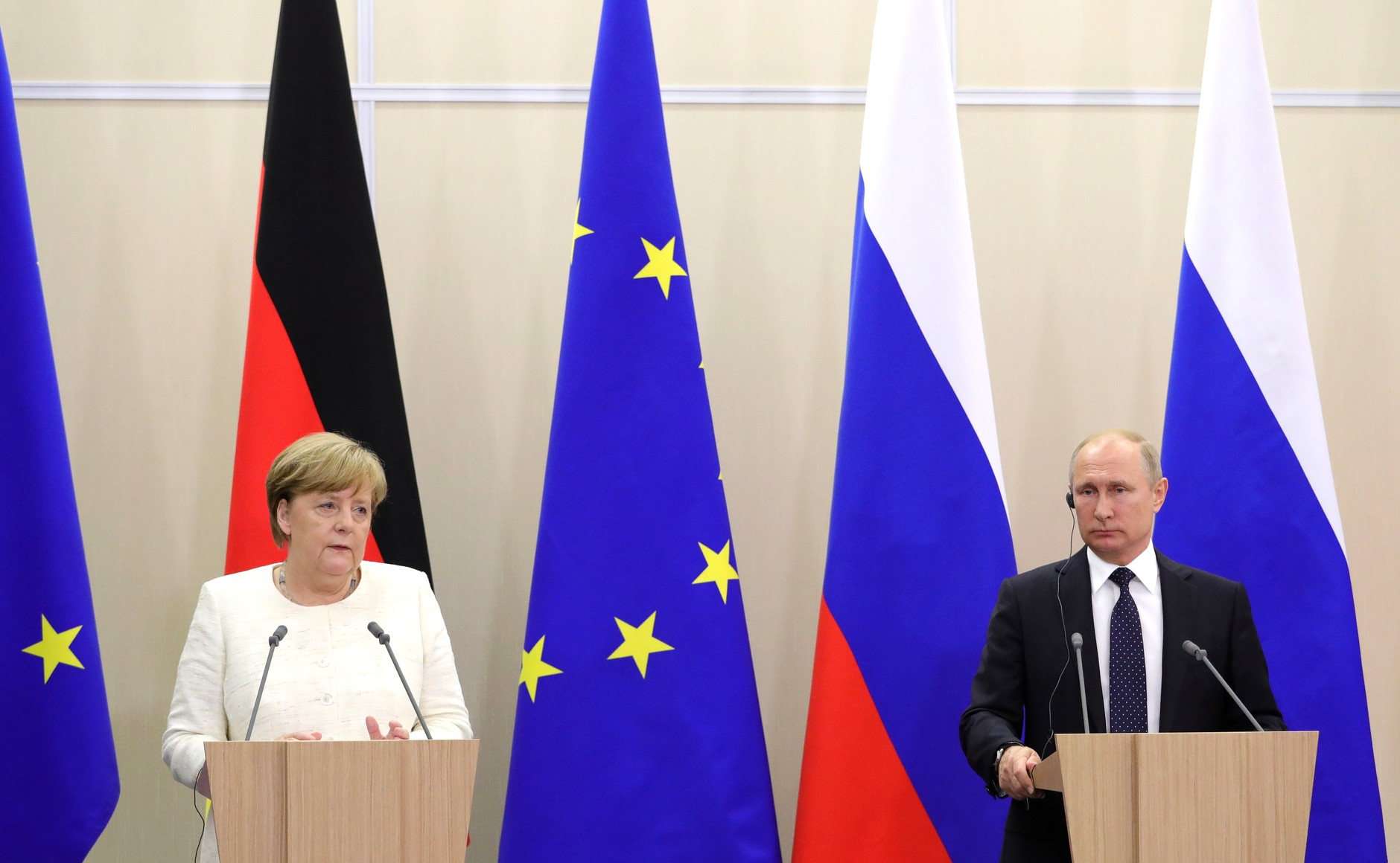 Совместная пресс-конференция Президента России Владимира Путина с Федеральным канцлером Германии Ангелой Меркель